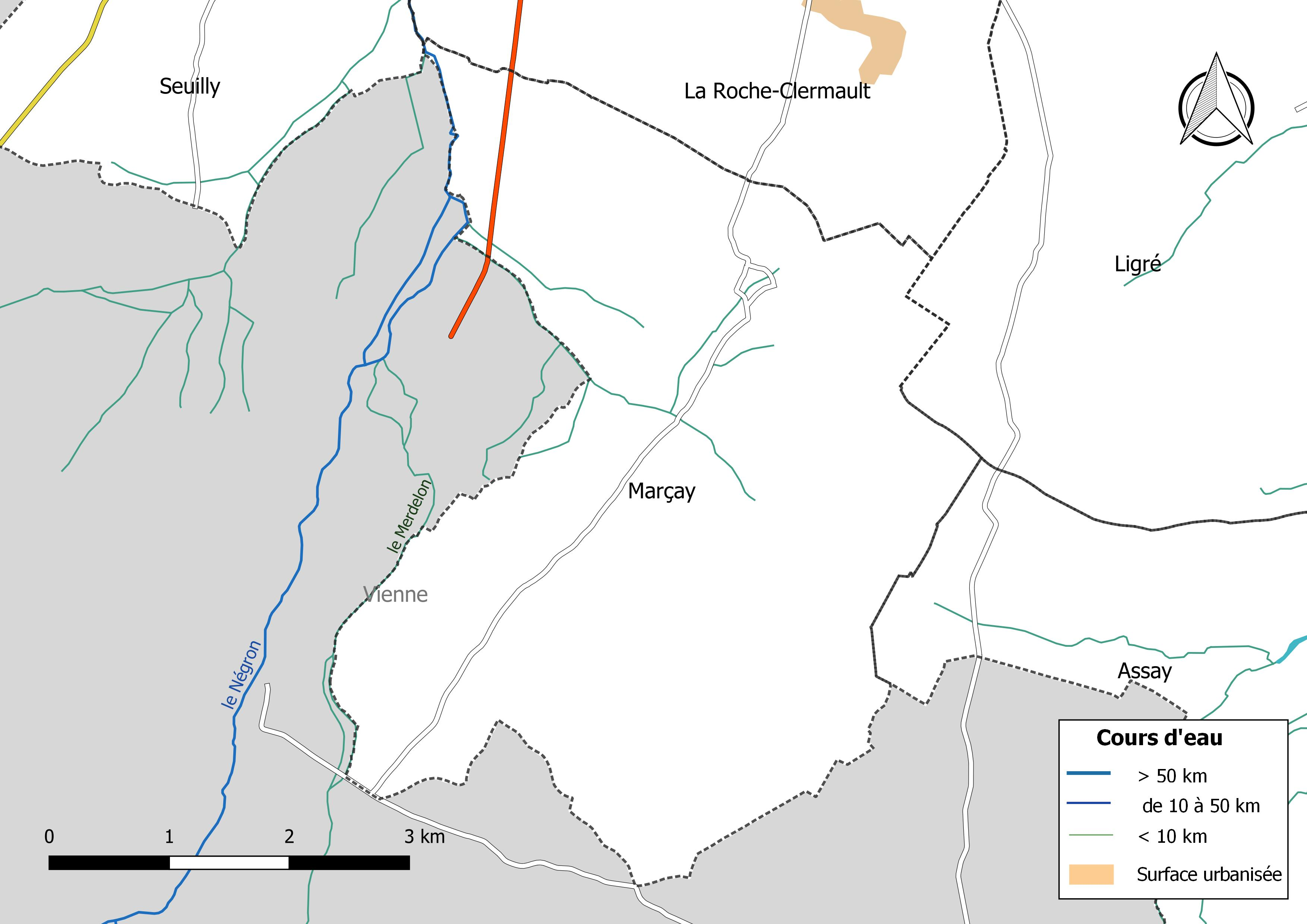 Carte du réseau hydrographique de la commune de Marçay (Indre-et-Loire) (France).